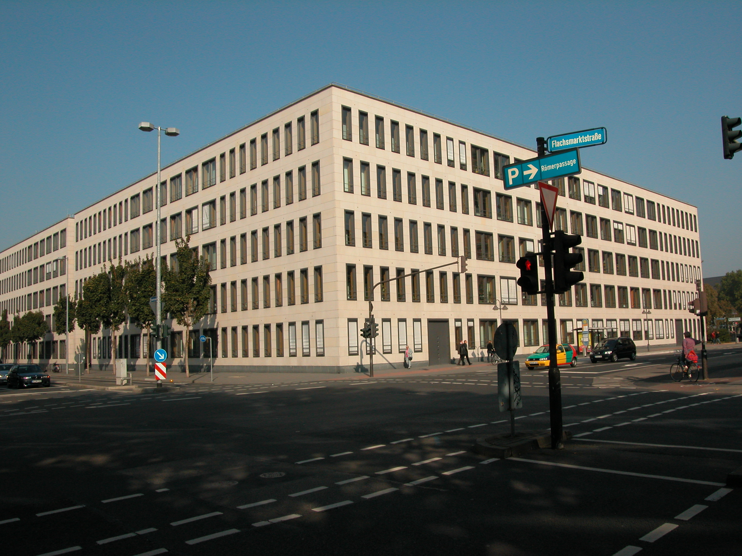 Blick auf das Umweltministerium vom Kreuzungsbereich Große Bleiche/Bauhofstraße